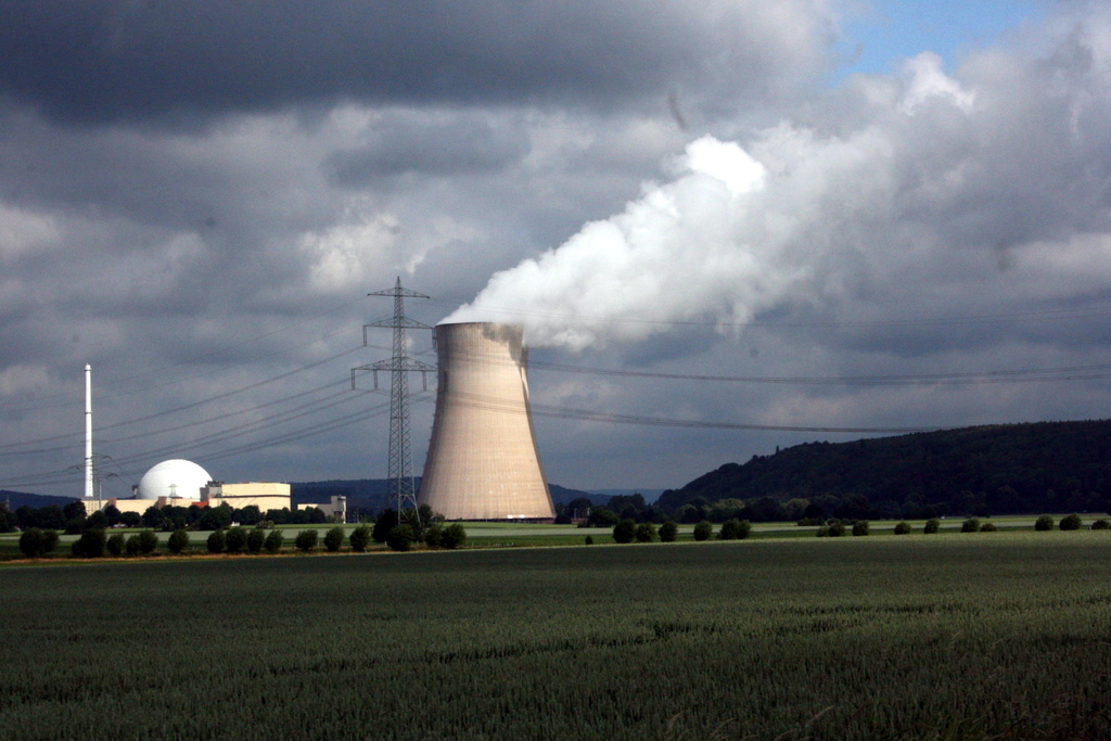 Landschaft um Grohnde/Niedersachsen mit Atomkraftwerk.